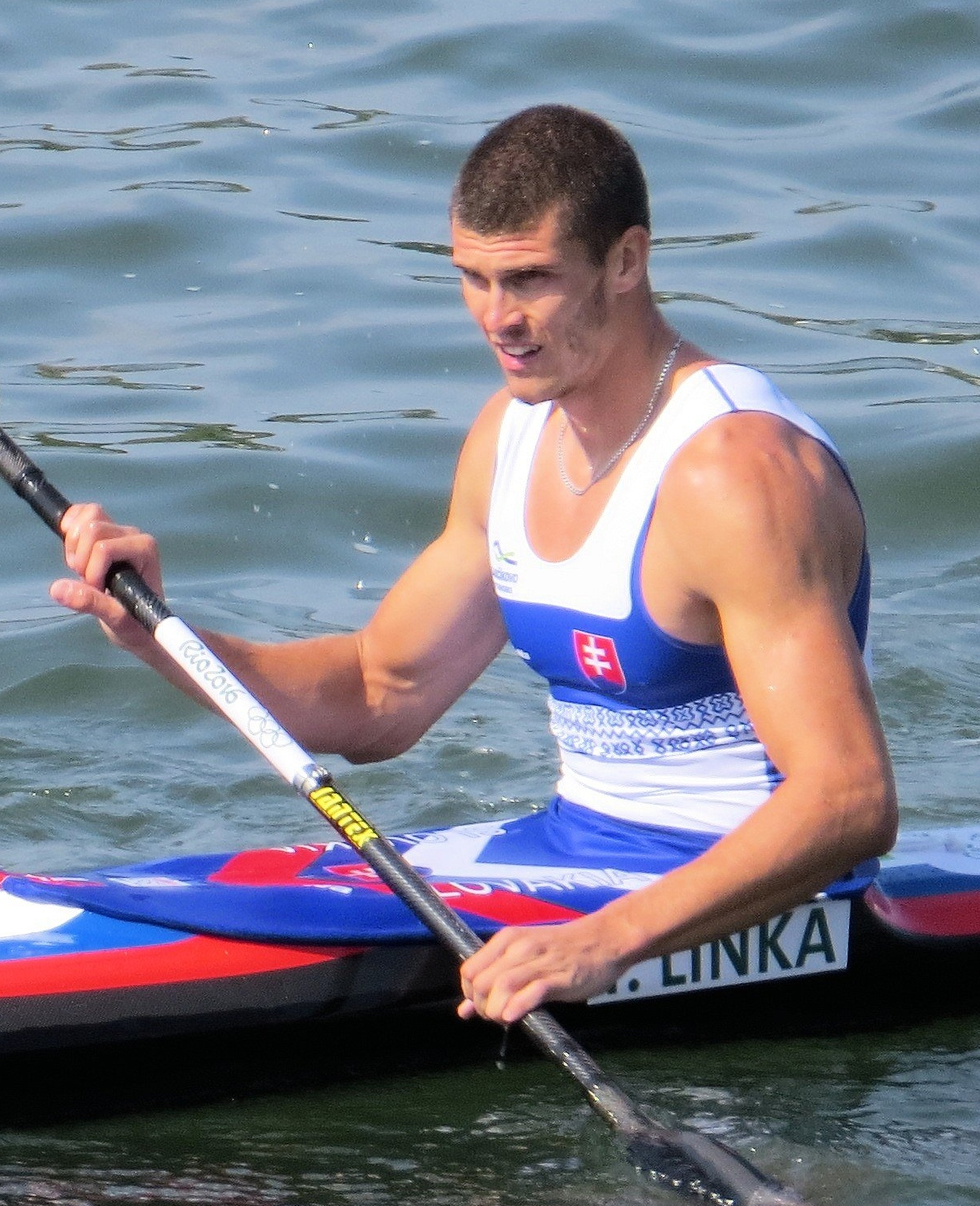 Sx50